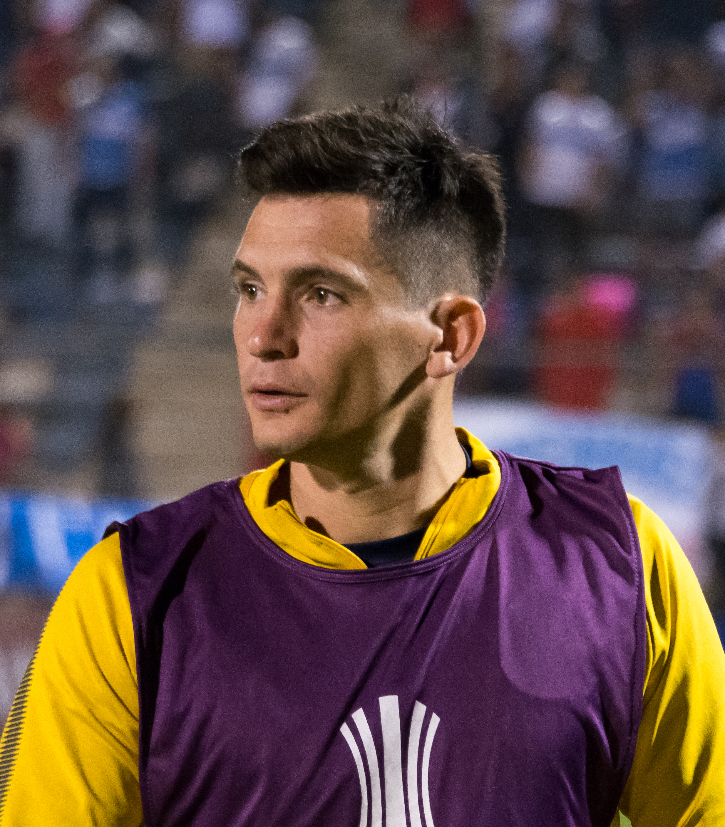 Alfonso Parot, Universidad Católica v Rosario Central, Estadio San Carlos de Apoquindo, Las Condes, Santiago, Chile.